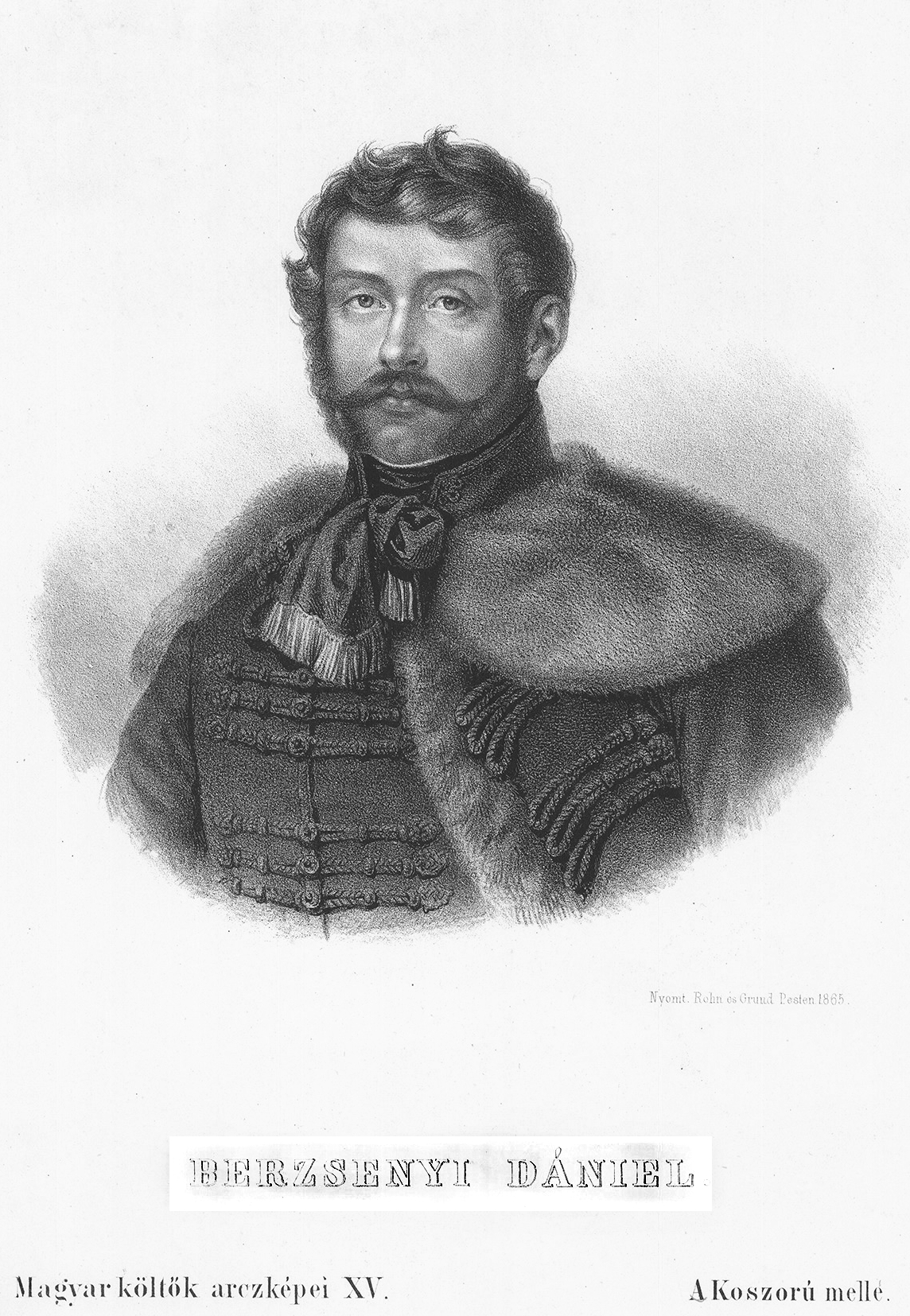 Berzsenyi Dániel (Egyházashetye, 1776. május 7. – Nikla, 1836. február 24.) magyar költő.